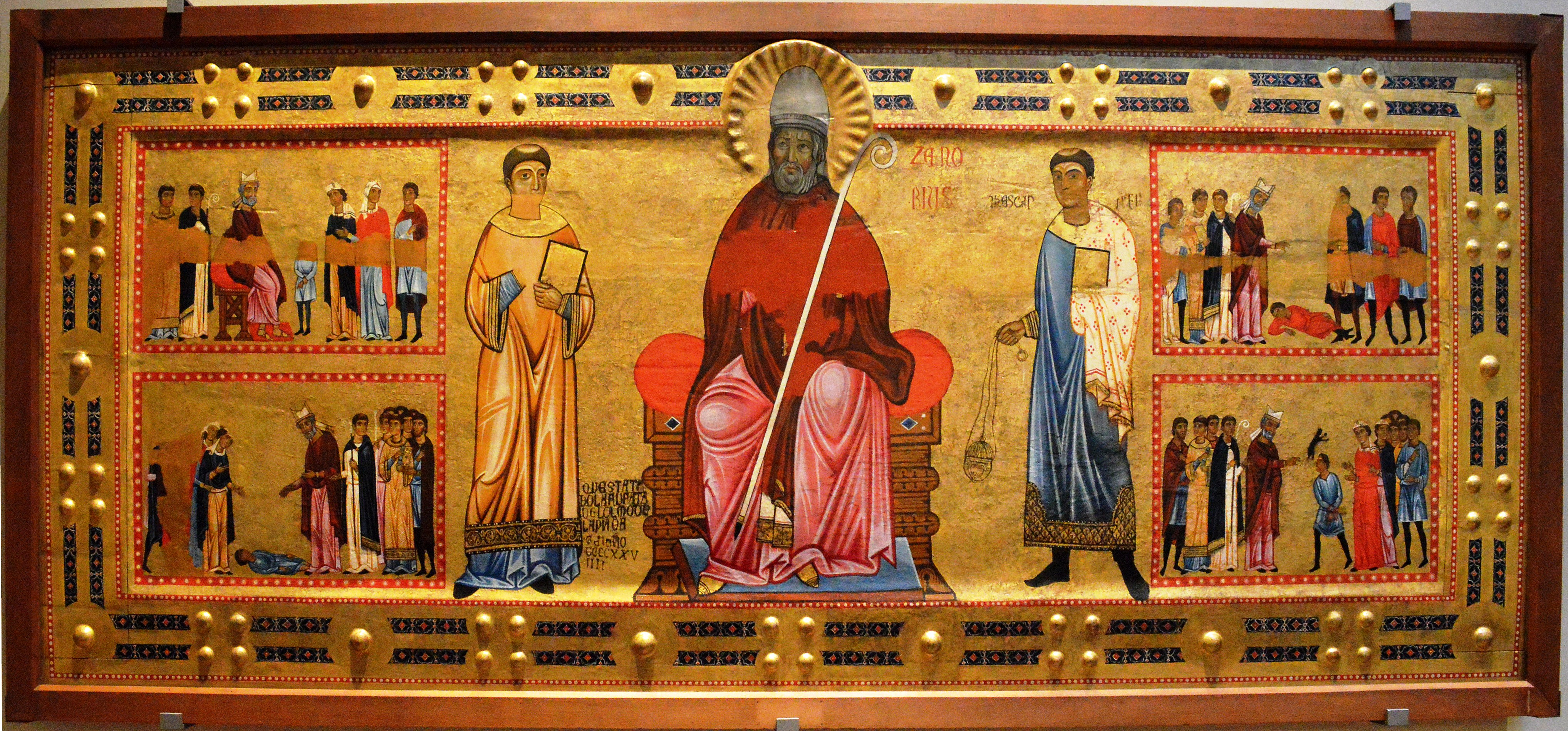 Maestro del Bigallo (attribuito a), Dossale di San Zanobi (1240 circa).